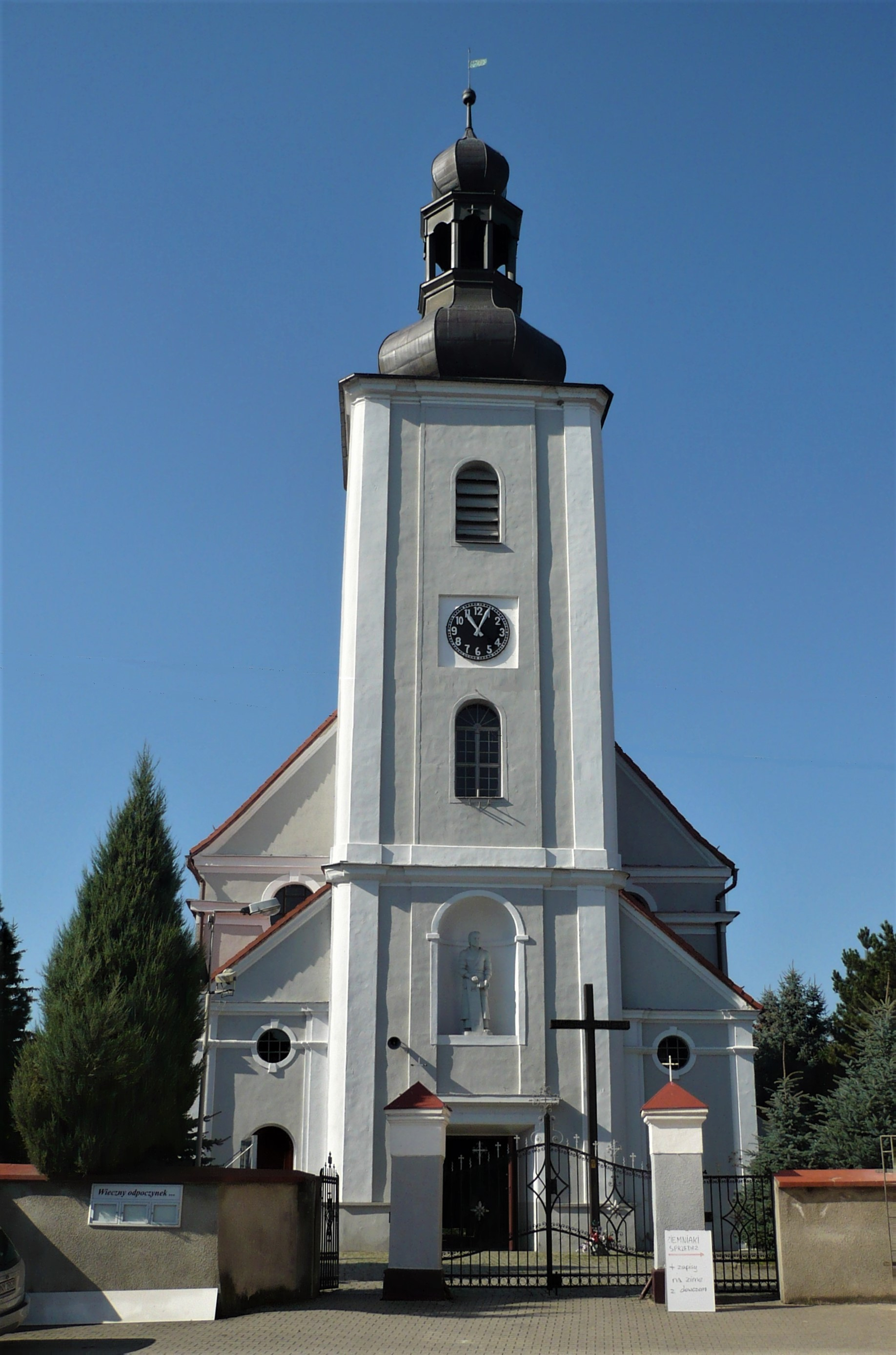 Bodzanów. Kościół św. Józefa